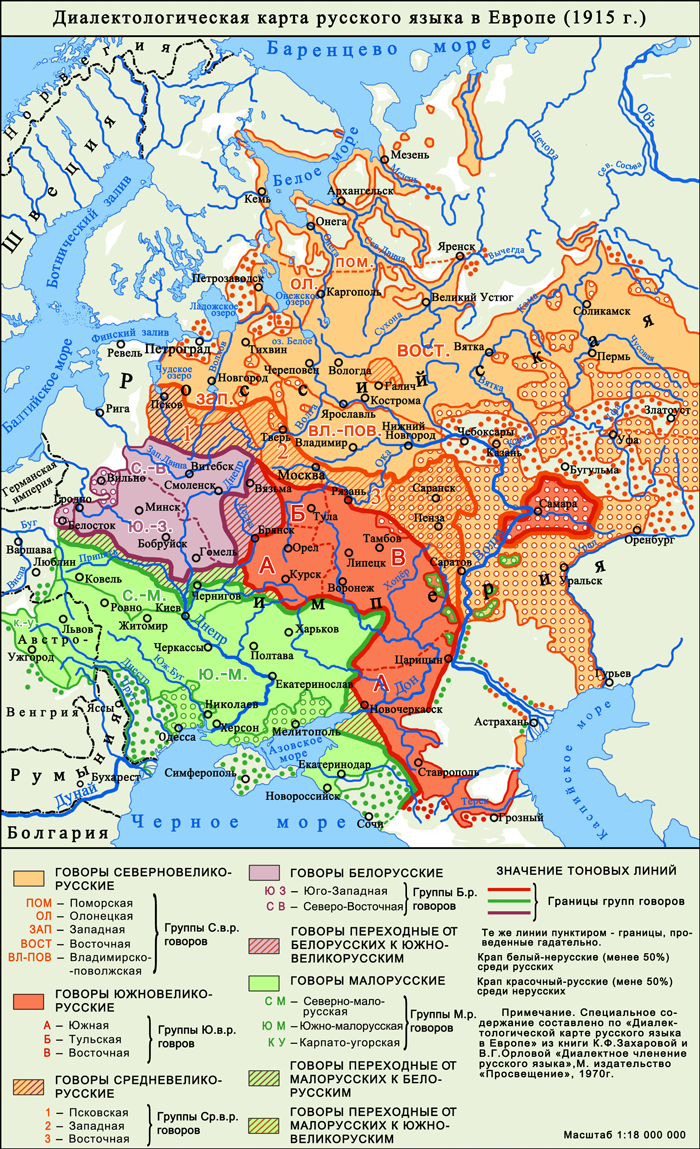 Диалектологическая карта русского языка 1915 года. На основе данных: К. Ф. Захарова, В. Г. Орлова. Диалектное членение русского языка. М.: Наука, 1970. 2-е изд.: М.: Едиториал УРСС, 2004 Русские. Монография Института этнологии и антропологии Н.Н. Дурново, Н. Н. Соколов, Д. Н. Ушаков. Опыт диалектологической карты русского языка в Европе, М., 1915